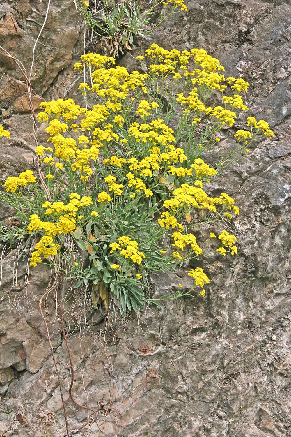 Alyssum saxatile from valley Berounka autor:Prazak